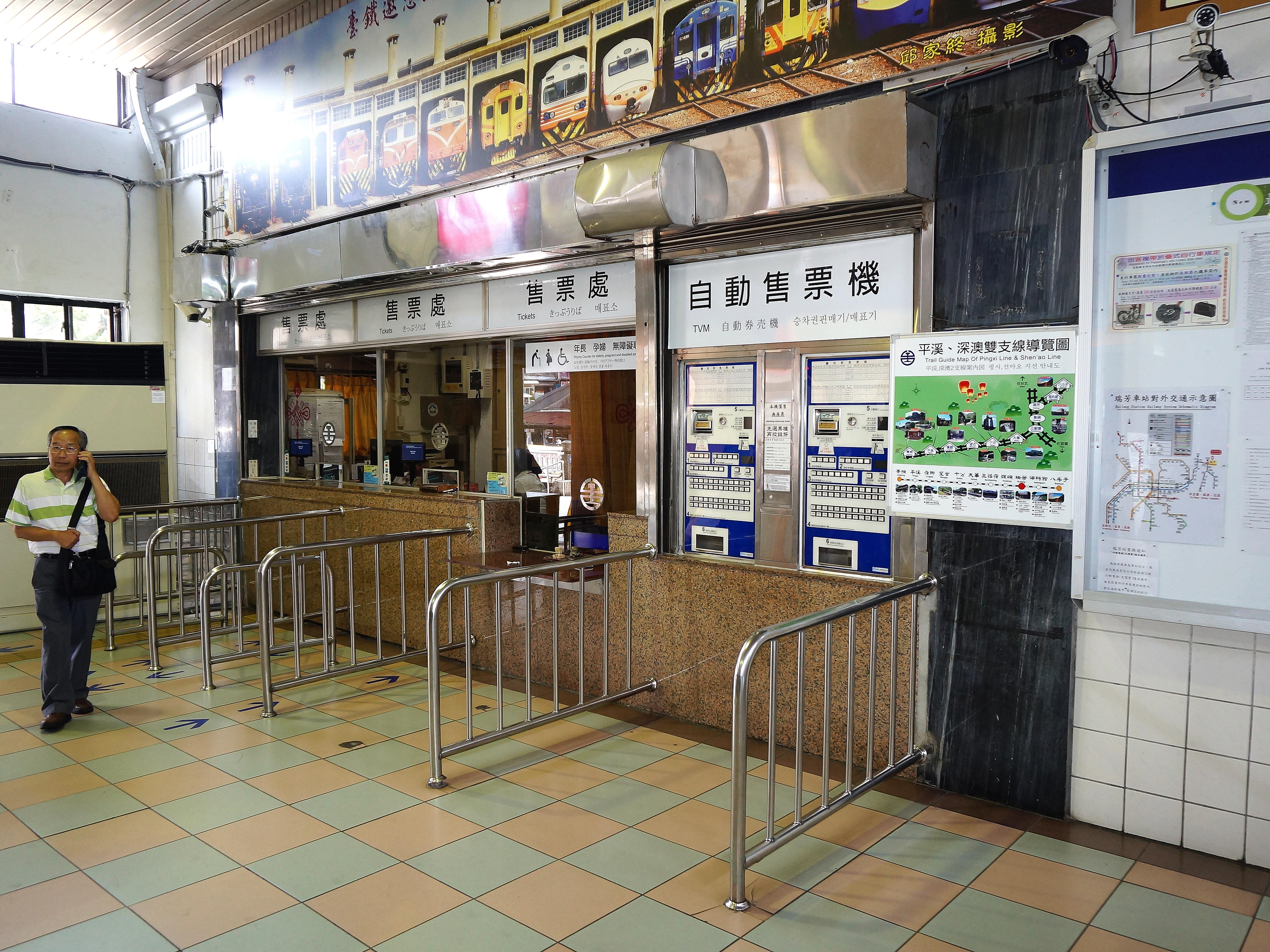 臺灣鐵路管理局瑞芳車站大廳，售票窗口與自動售票機。